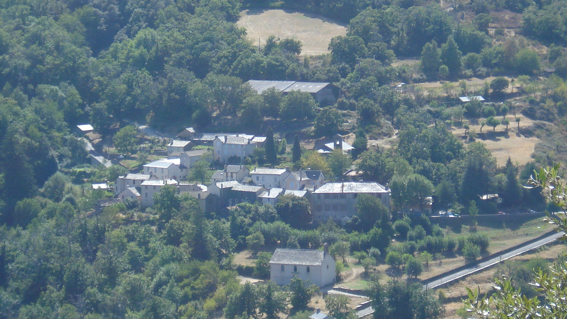 vue générale de Saint-Martin-de-Lansuscle depuis la RD 13